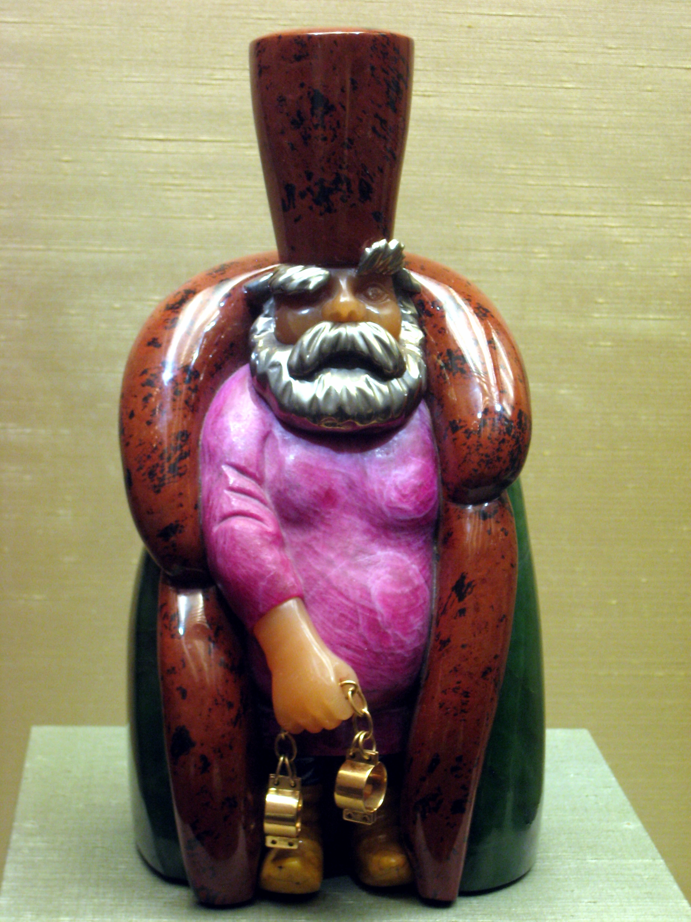 Опричник. Ленинград, 1978. Мастер В. Коноваленко. Нефрит, обсидиан, рубин, халькопирит, белорецкий кварц, яшма, бриллиант, золото. Собрание А. Коноваленко.